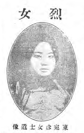 治家全書圖像